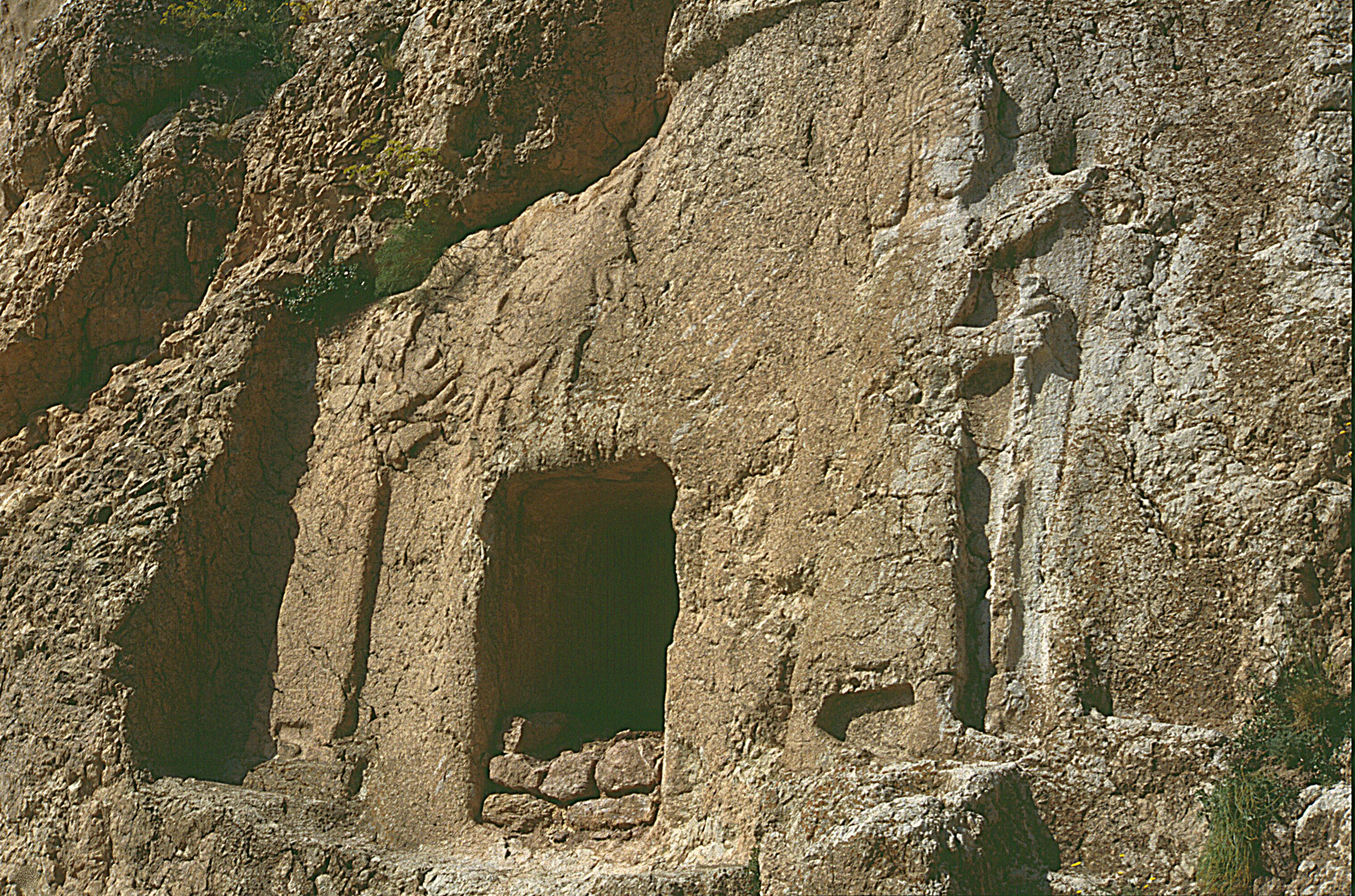 Eski Doğubeyazıt: urartäisches Felsengrab